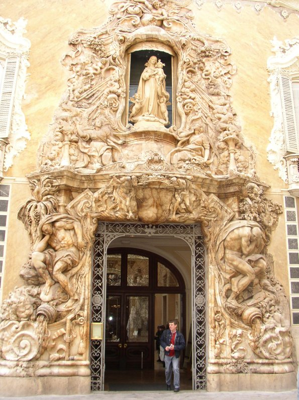 Valencia (Comunidad Valenciana), España. Valencia. Palacio del Marqués de Dos Aguas. Fotografía realizada el 22 febrero de 2003 por el autor Usuario. Pelayo2.